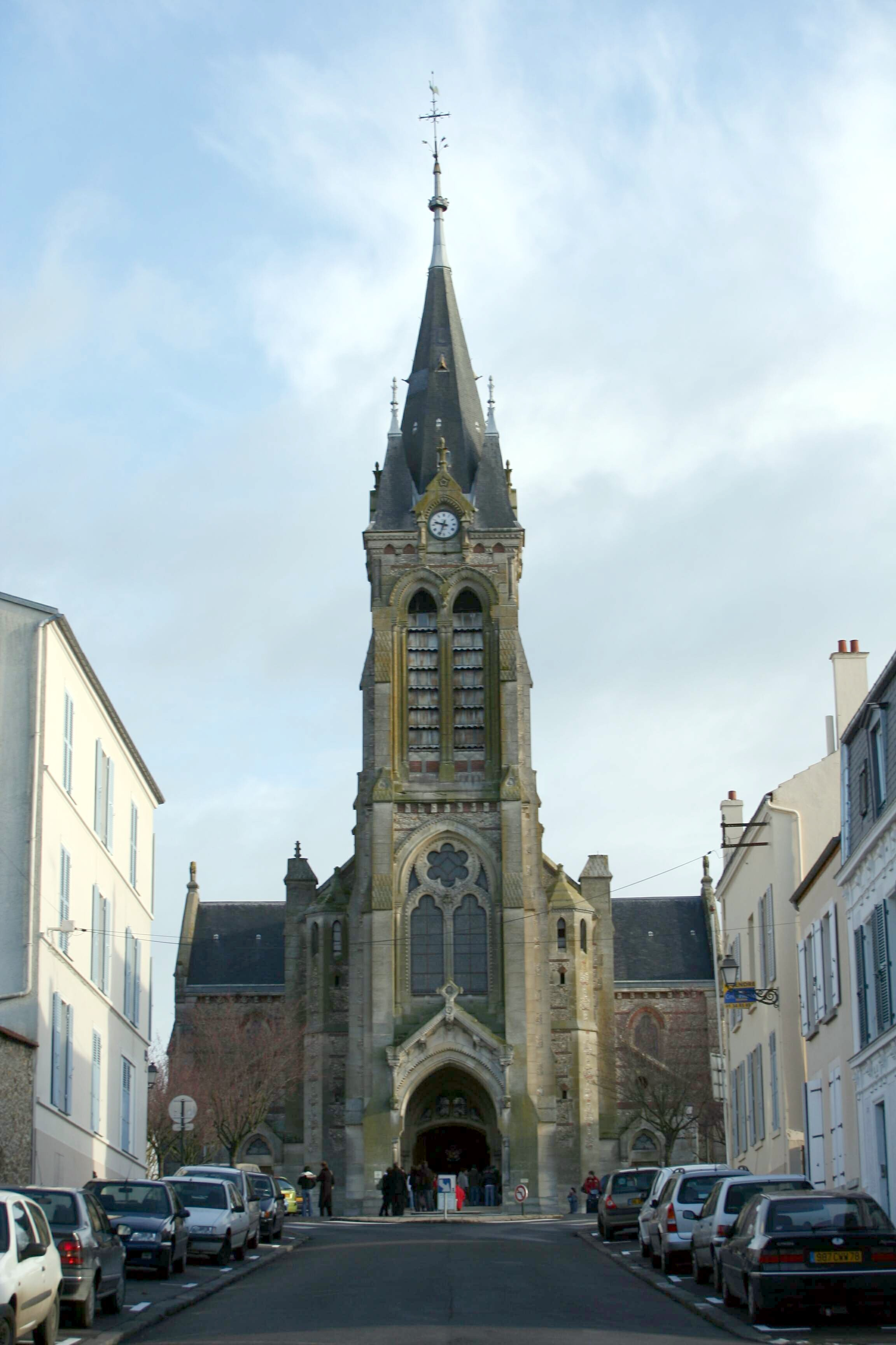 Église de Rambouillet - Yvelines (France)